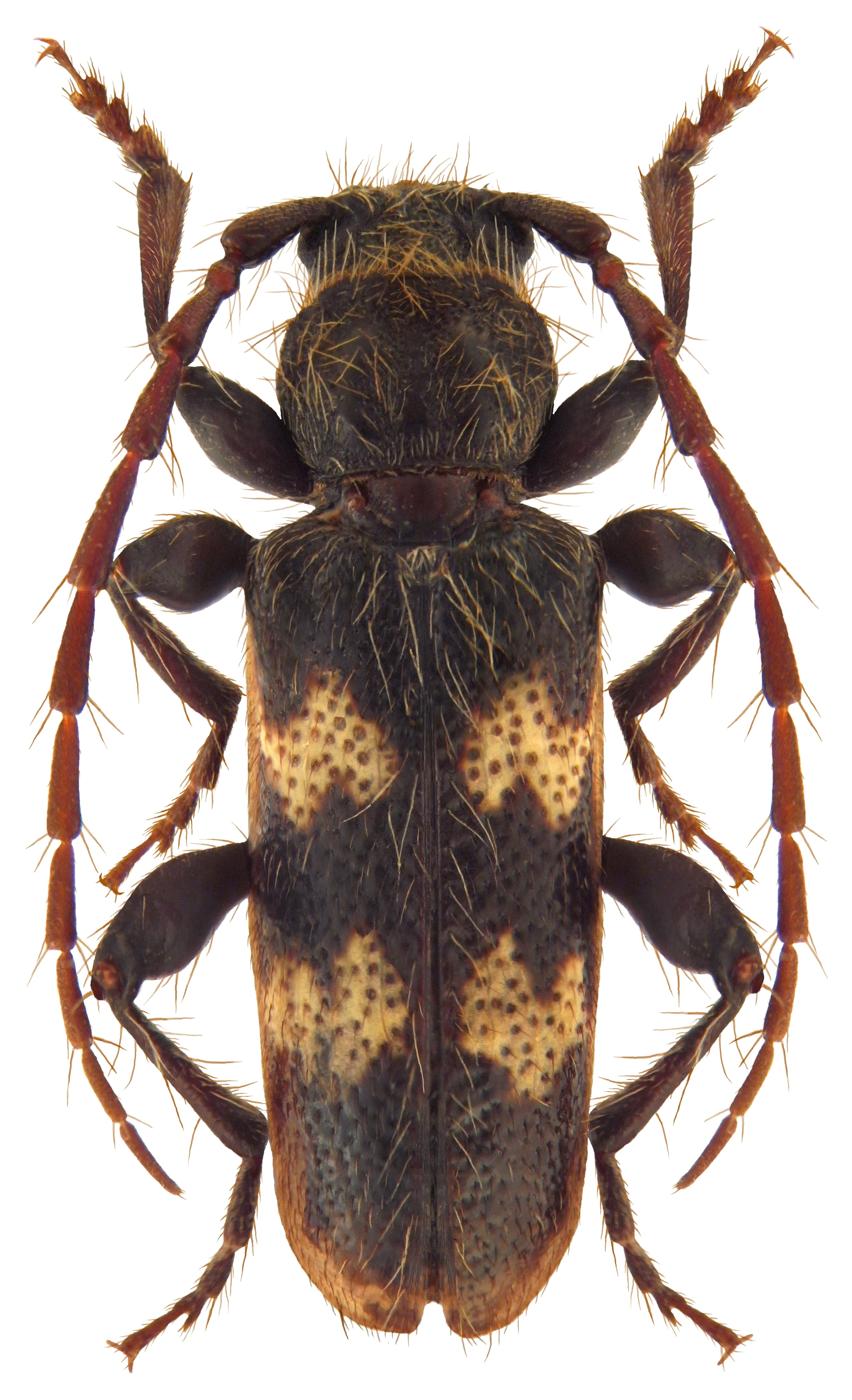 Familie: Cerambycidae Groesse: 9,7 mm Verbreitung: boreomontan: Alpengebiet, Osteuropa, Skandinavien Ökologioe: Entwicklung in Nadelholz det. U.Schmidt, 2010 Photo: U.Schmidt, 2010